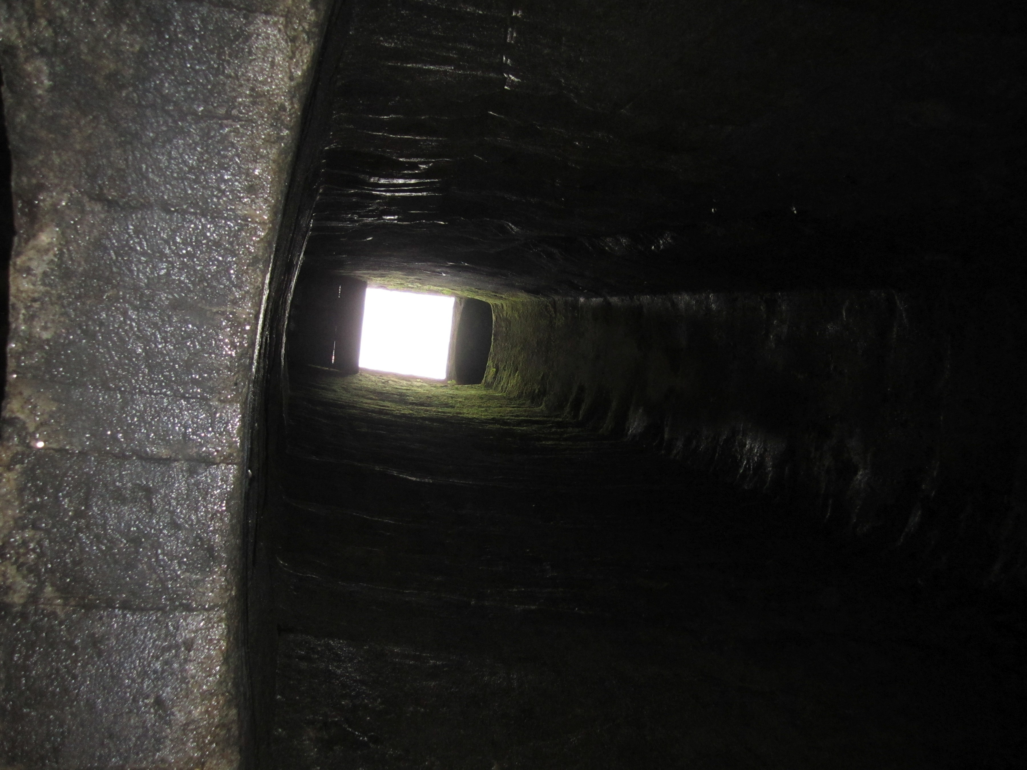 Blick aus dem Caroliner Wetterschacht. Clausthal, Gemeinde Clausthal-Zellerfeld, Niedersachsen, Deutschland.